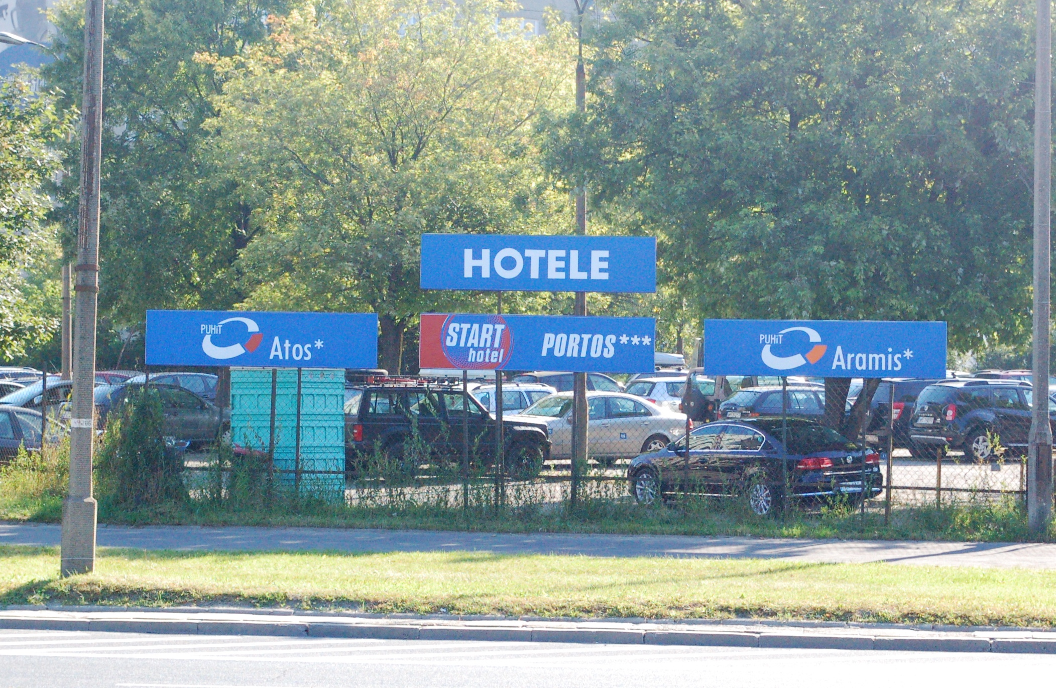 Start Hotels Warschau an der Sobieskiego-Strasse: Aramis, Atos, Portos